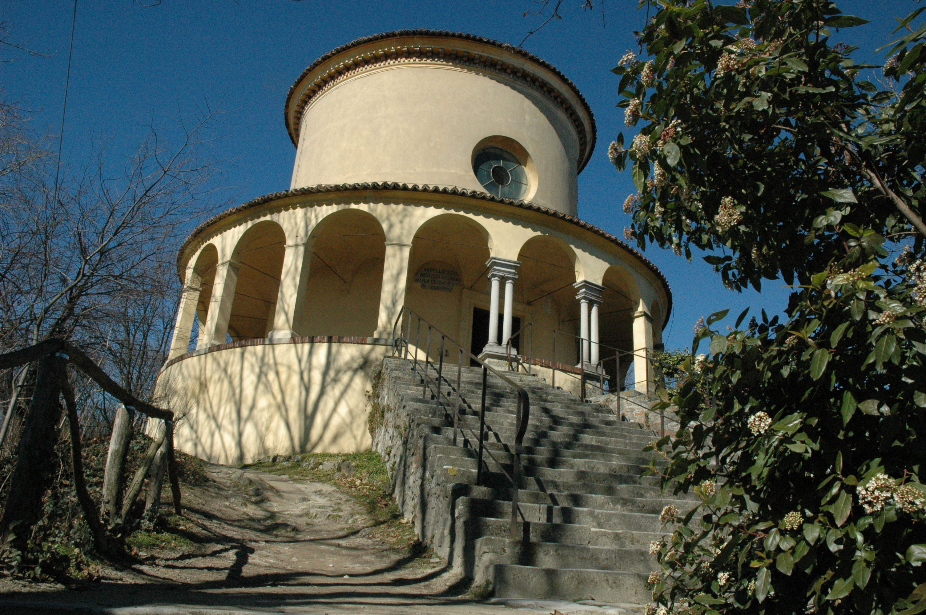 Sacro Monte di Crea. Cappella del Paradiso